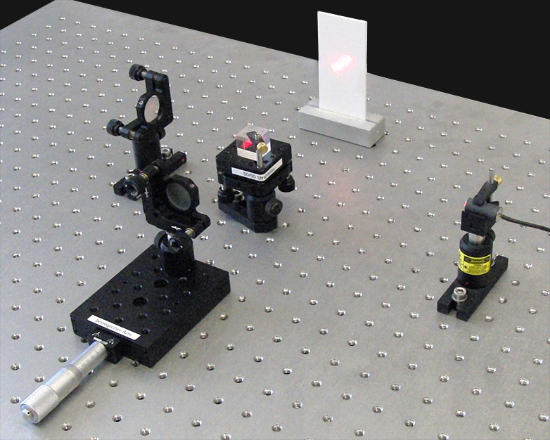 Aufbau eines Michelson-Interferometers mit Diodenlaser, Strahlteilerwürfel, einem fest stehenden und einem verschiebbaren Spiegel.